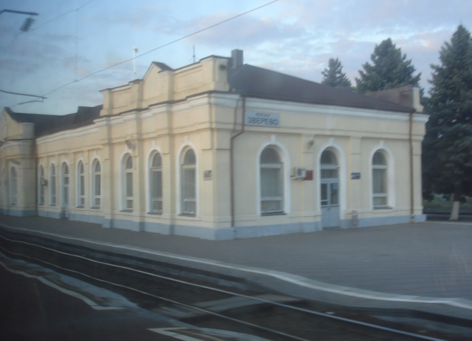 Здание ЖД-станции Зверево